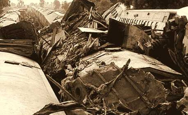 Accidente ferroviario de Benavídez, Buenos Aires, Argentina (1970)